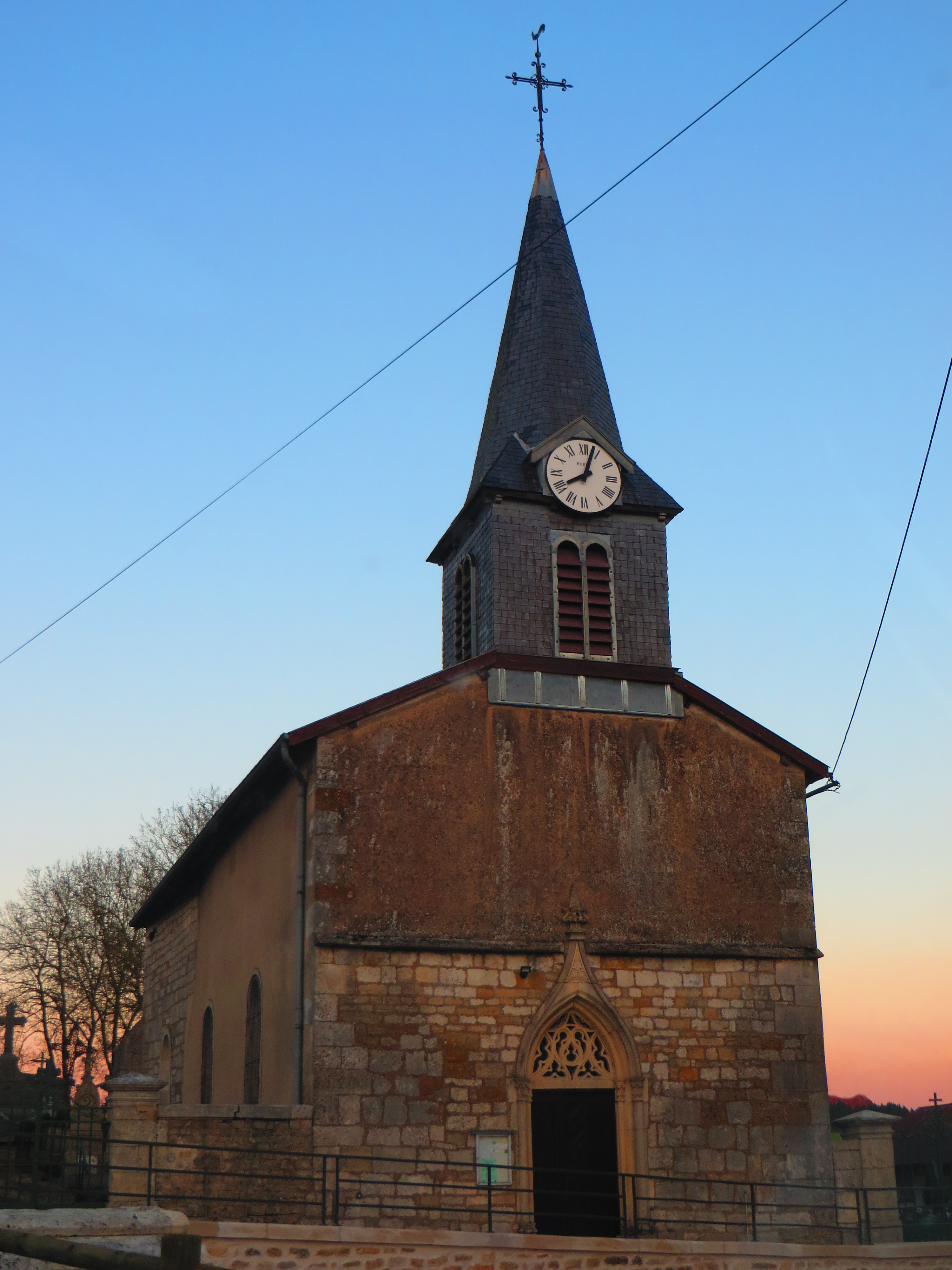 Delouze-Rosières (Meuse, France). L'église Saint-Genebaud de Rosières-en-Blois.